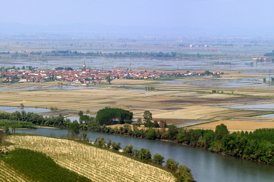 Panorama delle risaie del basso vercellese con il fiume Po dai primi rilievi del Monferrato Casalese. In secondo piano l'abitato di Fontanetto Po (VC)